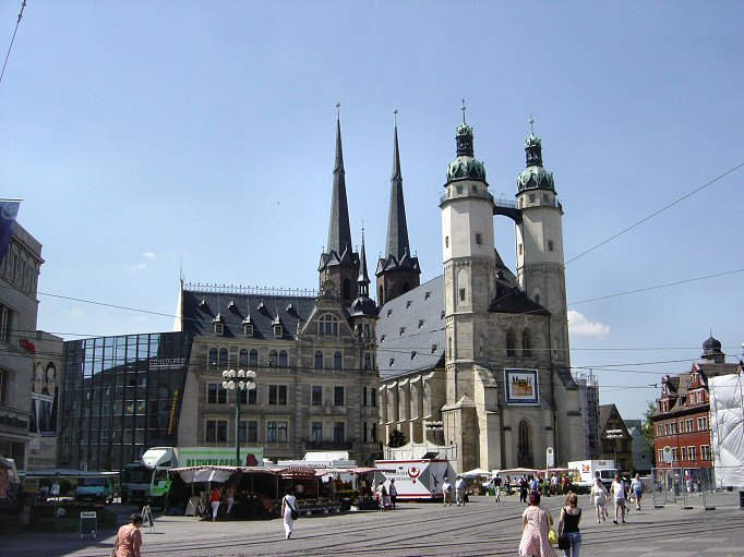 Halle an der Saale: Markt. Eigen foto, augustus 2004